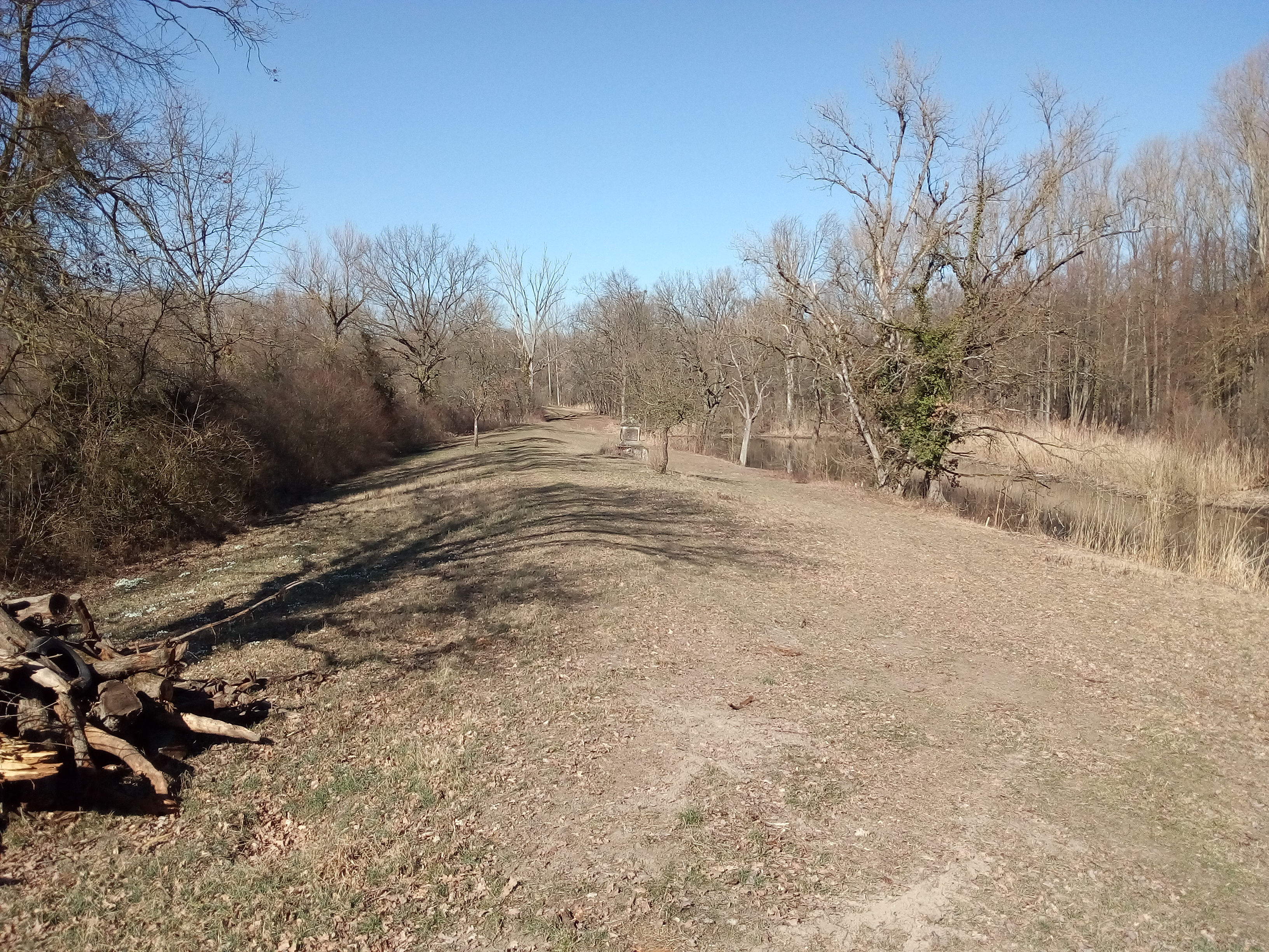 1787/1788 von Johannes Andreas von Traitteur gebauter Damm zur Beseitigung der Rheininsel Ceylon